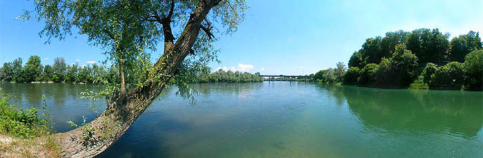 Sotočje rek Save in Krke